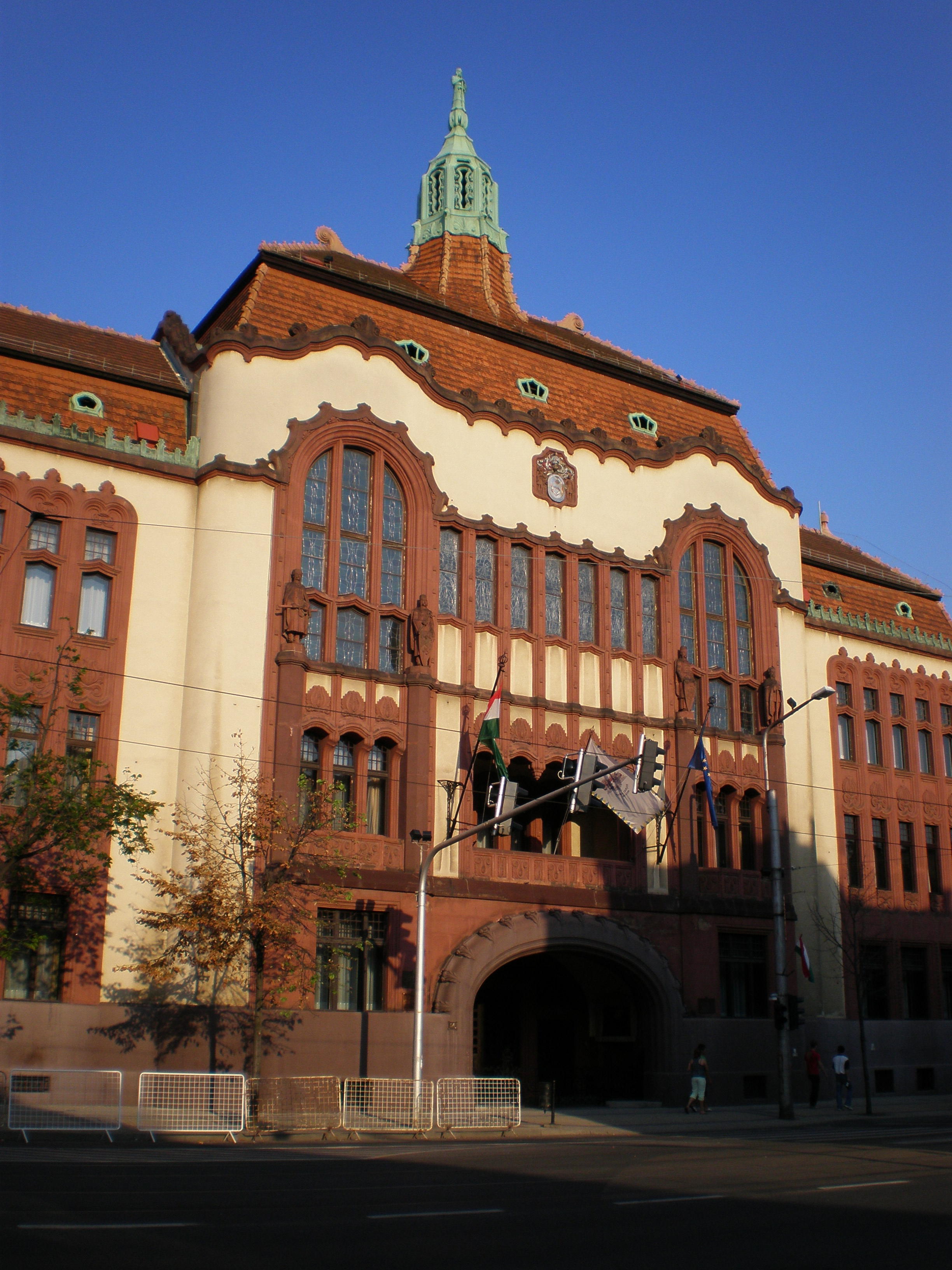 Altes Komitatshaus in Debrecen Zoltán Bálint - Lajos Jámbor, 1911-1912